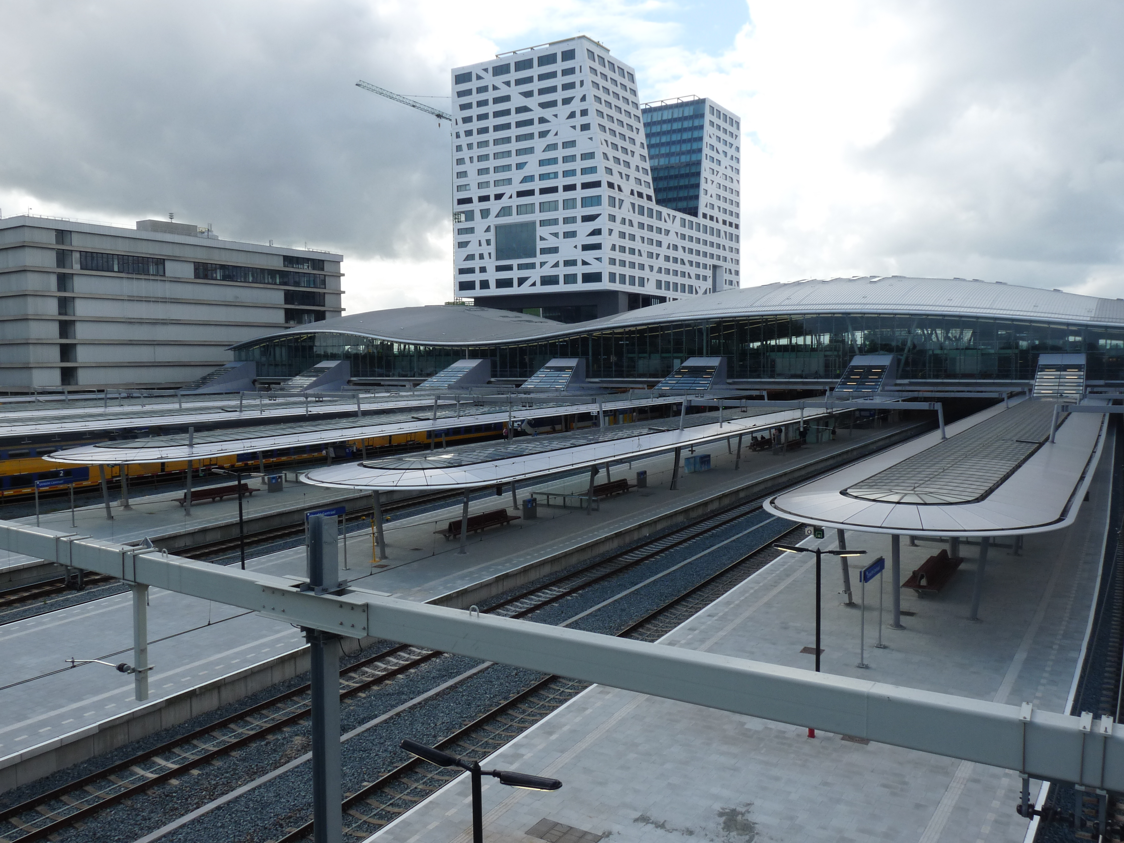 Utrecht Centraal gezien vanaf de voetgangersbrug